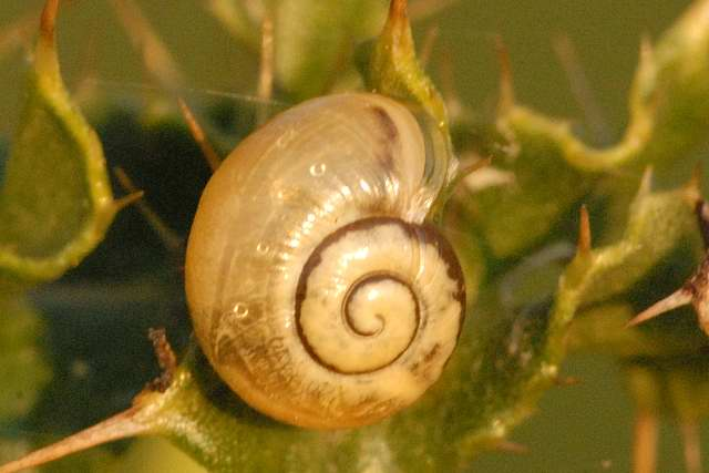 Vitrina pellucida from Commanster, Belgian High Ardennes .